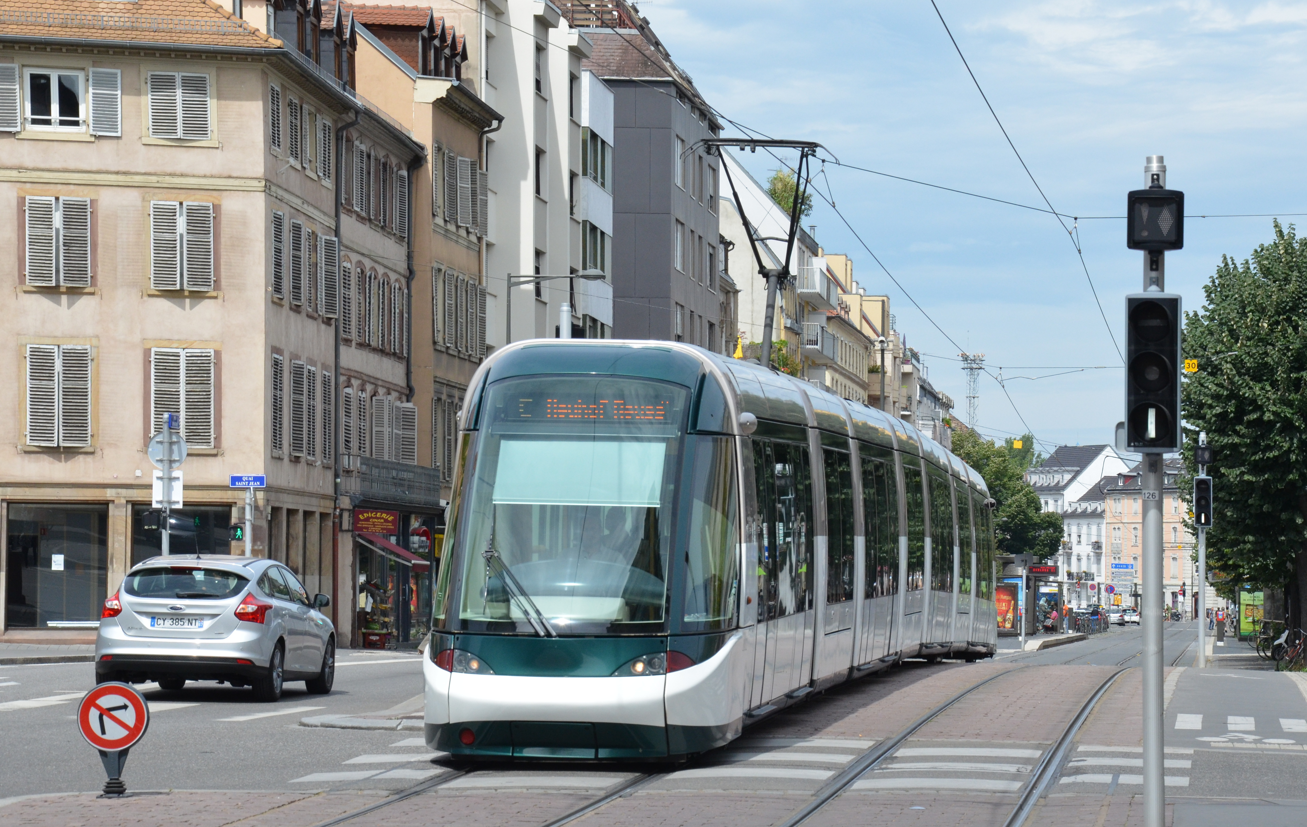 Alstom Citadis 403 n°2032 sur la ligne C du réseau CTS de Strasbourg, approchant de la station Homme de Fer.